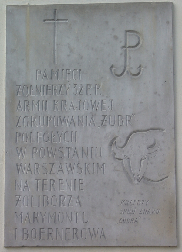 Tablica upamietniajaca poleglych zolnierzy zgrupowania AK Żubr (na scianie kosciola Matki Boskiej Królowej Polski przy ul. Gdanskiej w Warszawie